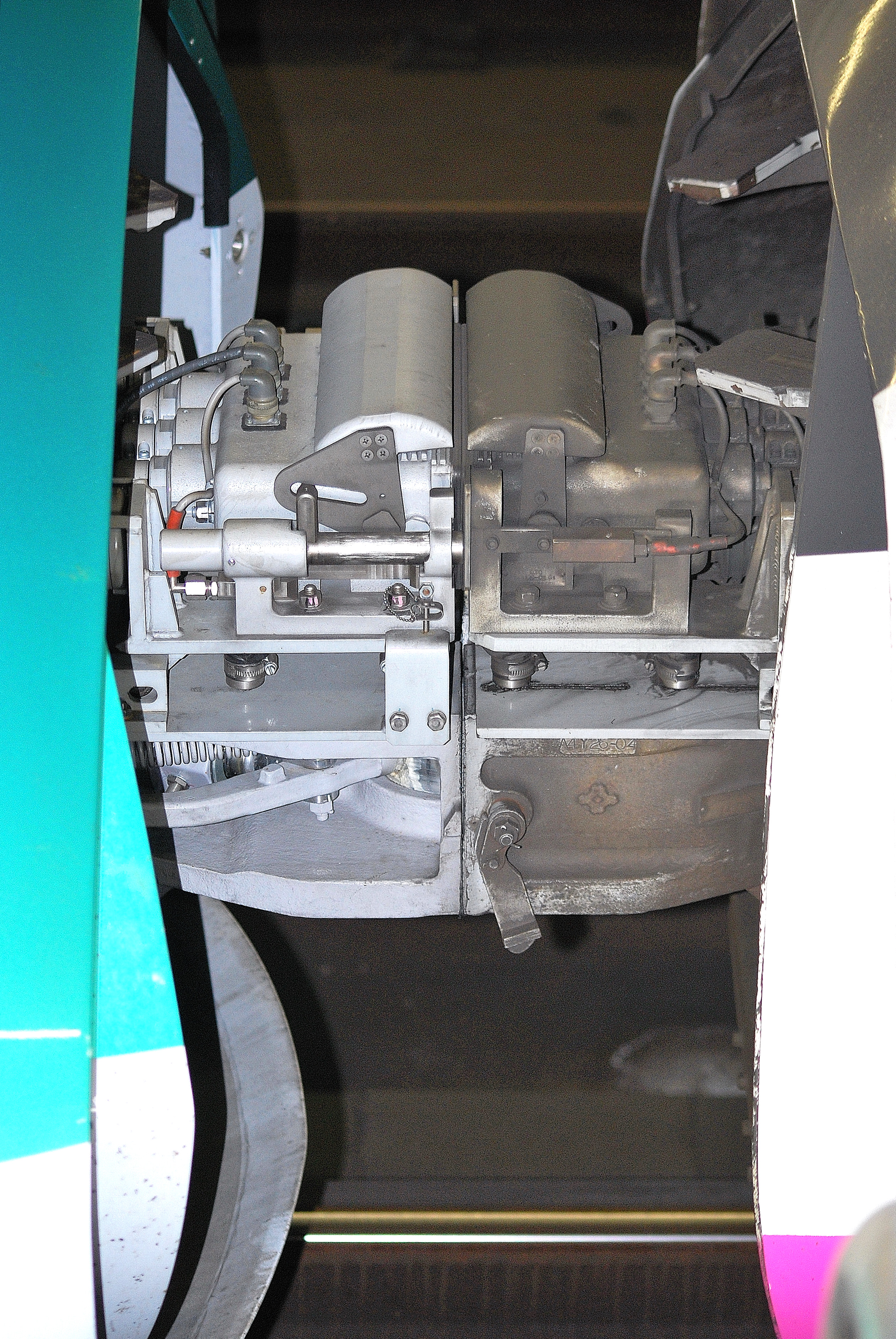 E5系とE3系の新幹線用密着連結器同士の連結状態（ホームから撮影）